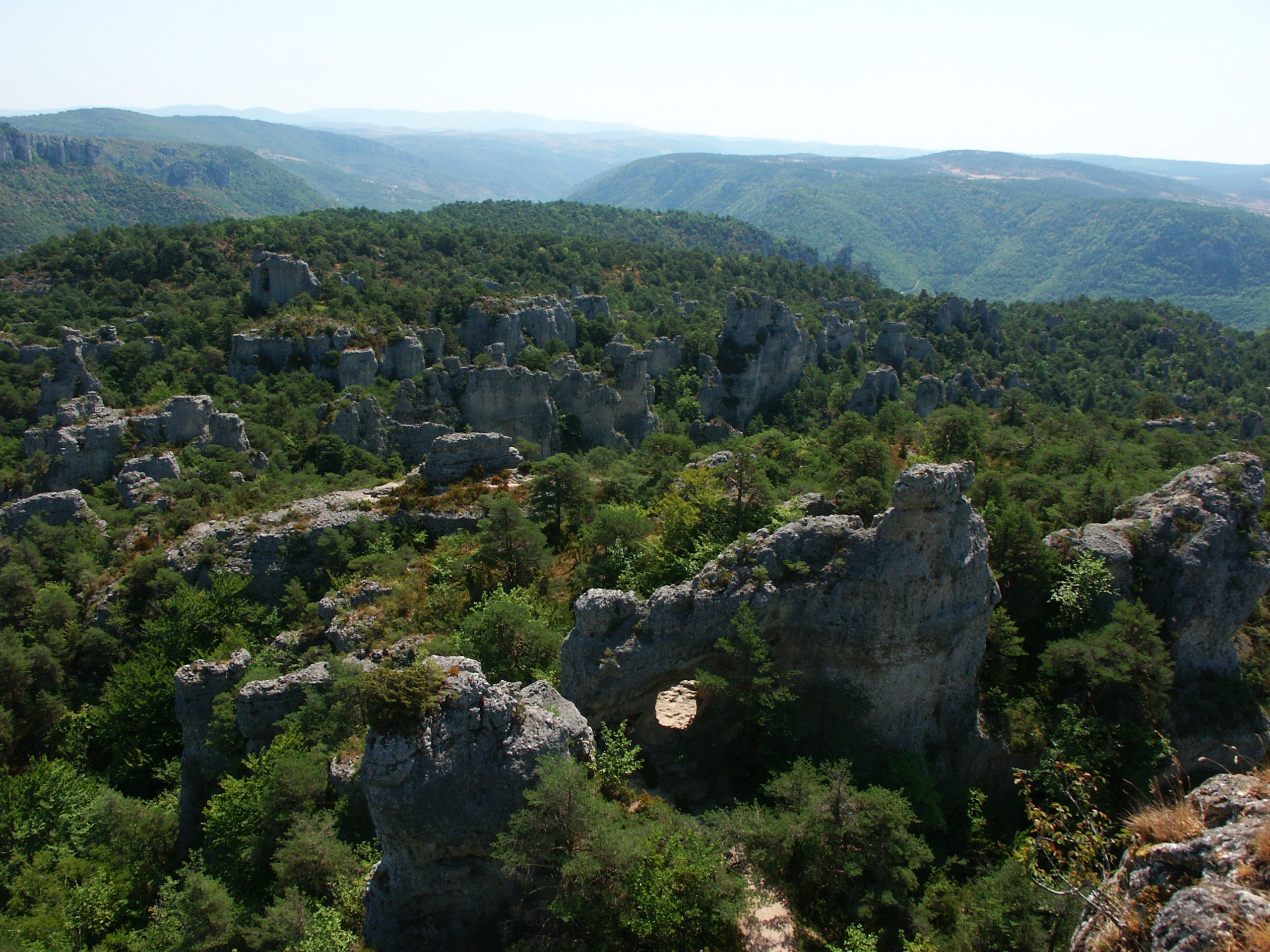 Chaos de Montpellier-le-Vieux (Aveyron, France). Vue depuis le Douminial, point culminant du Chaos.